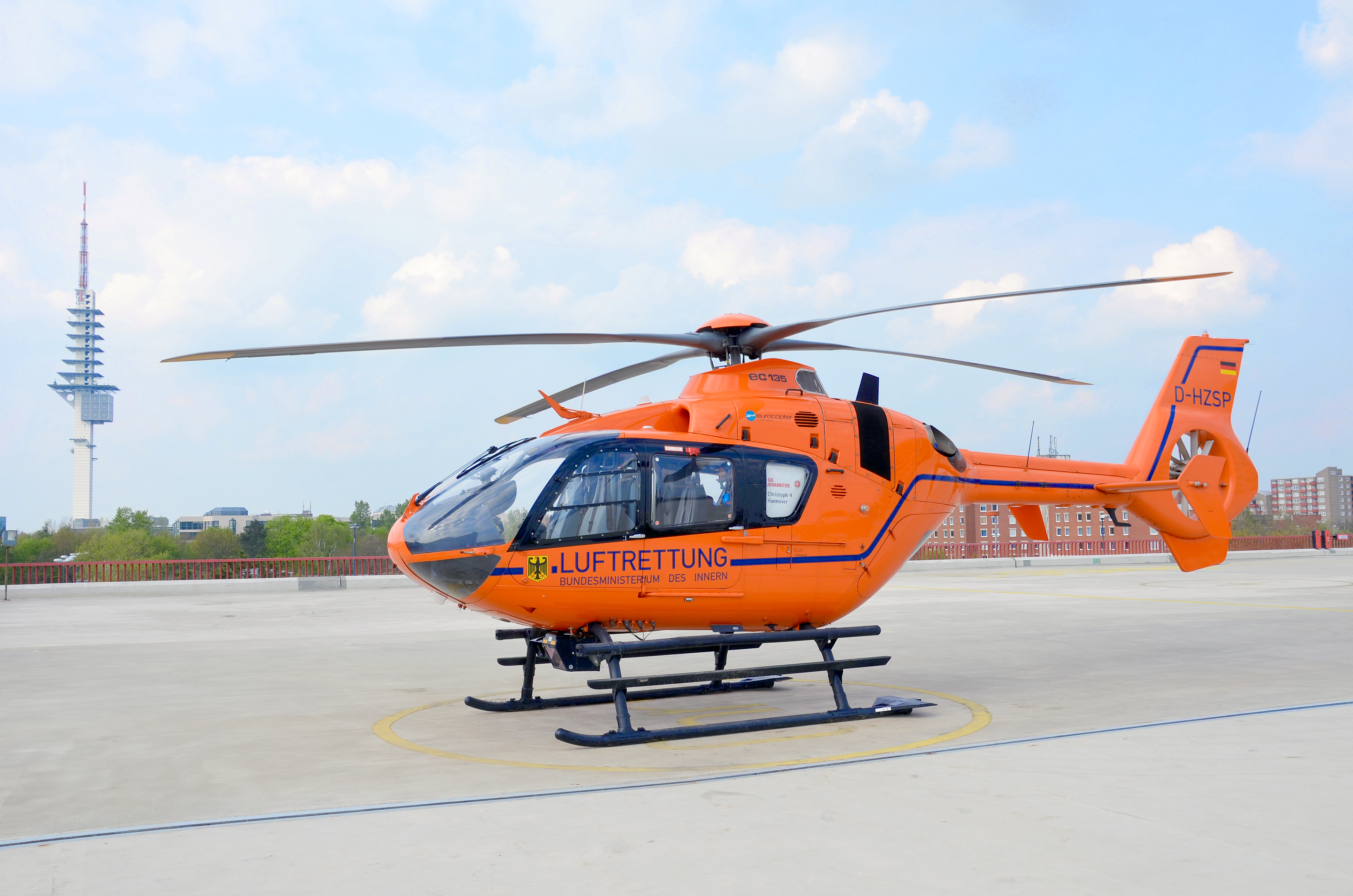 Die oberhalb der Parkplätze der Medizinischen Hochschule Hannover stationierte Luftrettungsstation, der Rettungshubschrauber Christoph 4, hier gesehen in Warteposition mit Blick in Richtung des Fernmeldeturms Telemax ...